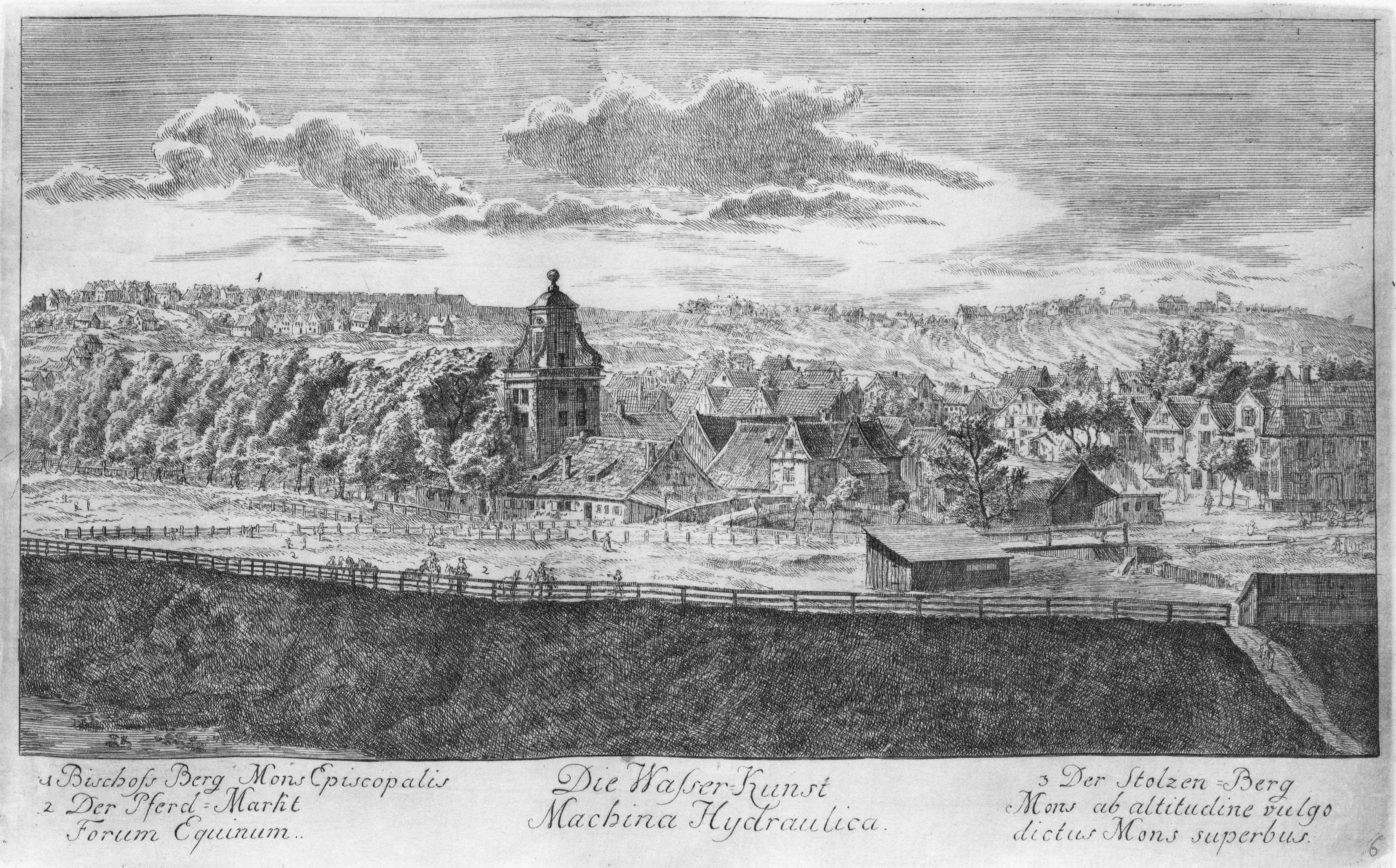 Rycina przedstawia widok na Gdańsk. Na pierwszym planie Kunszt Wodny. (1765)